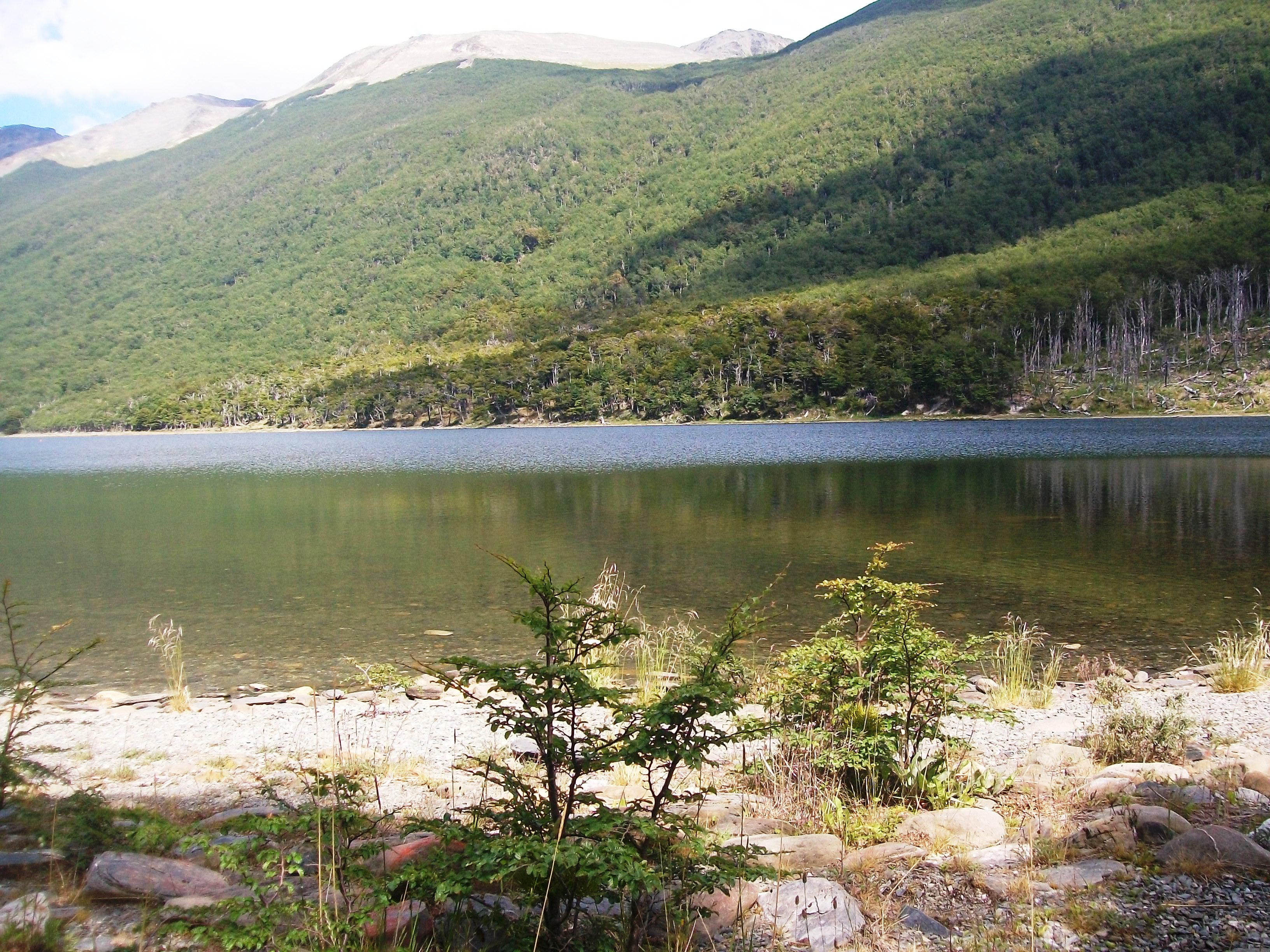 Lago Margarita en Tierra del Fuego, Argentina